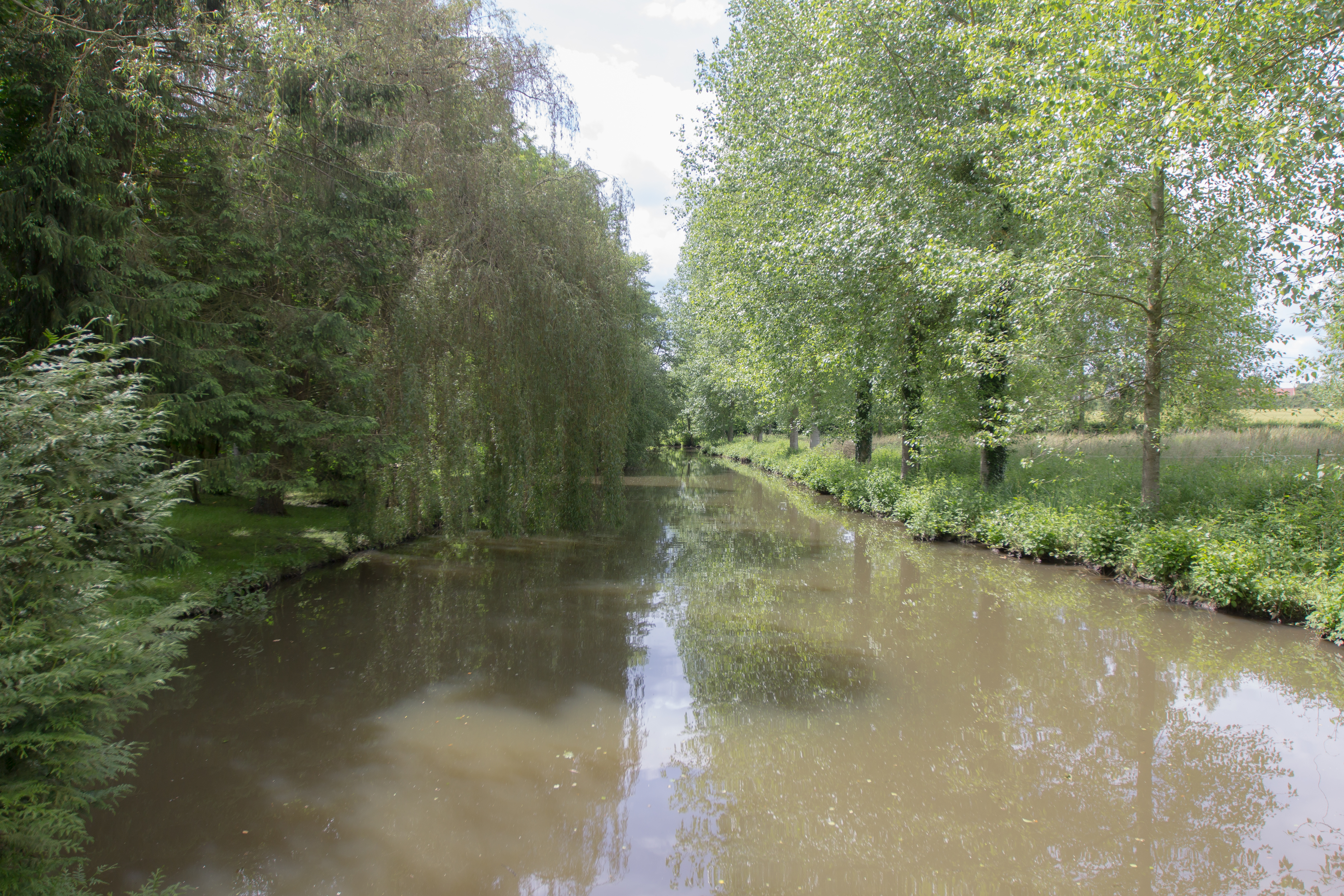 La rivière Iton à Chandai (Orne, Normandie, France)